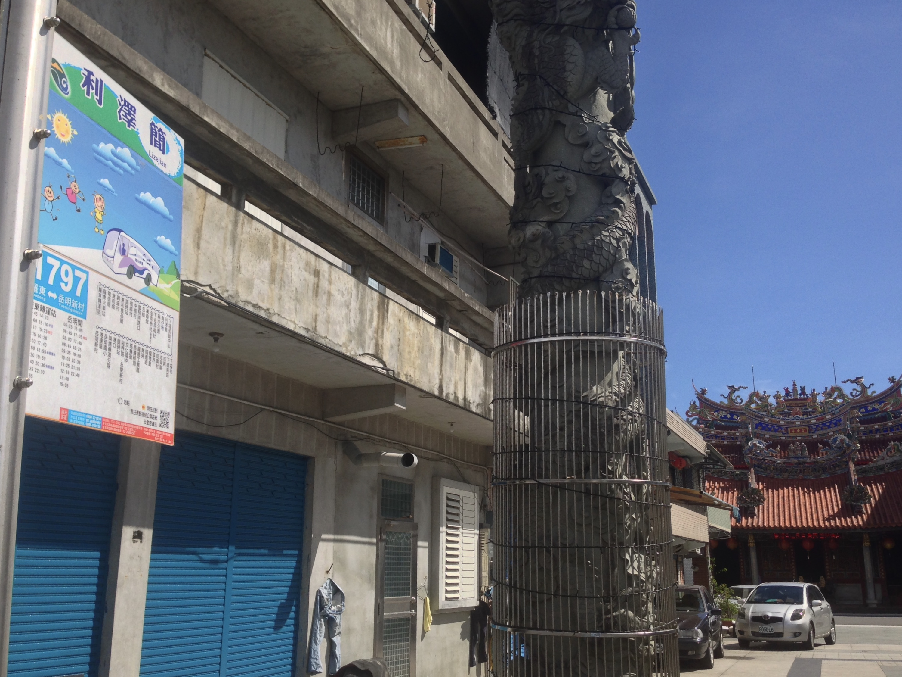 利澤簡公車站牌與利澤簡永安宮